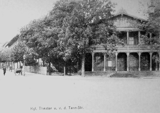 Königliches Kurtheater in Bad Kissingen (um 1890/1900)